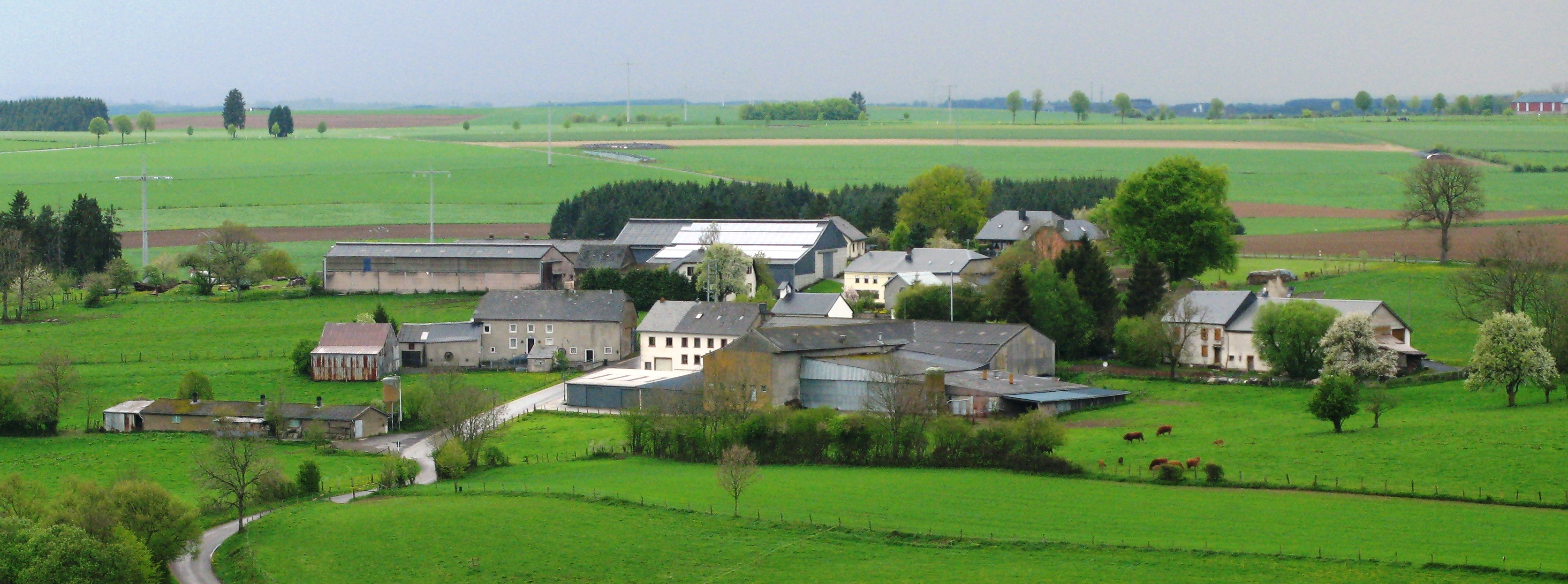 Quell:Archiv Les Meloures.